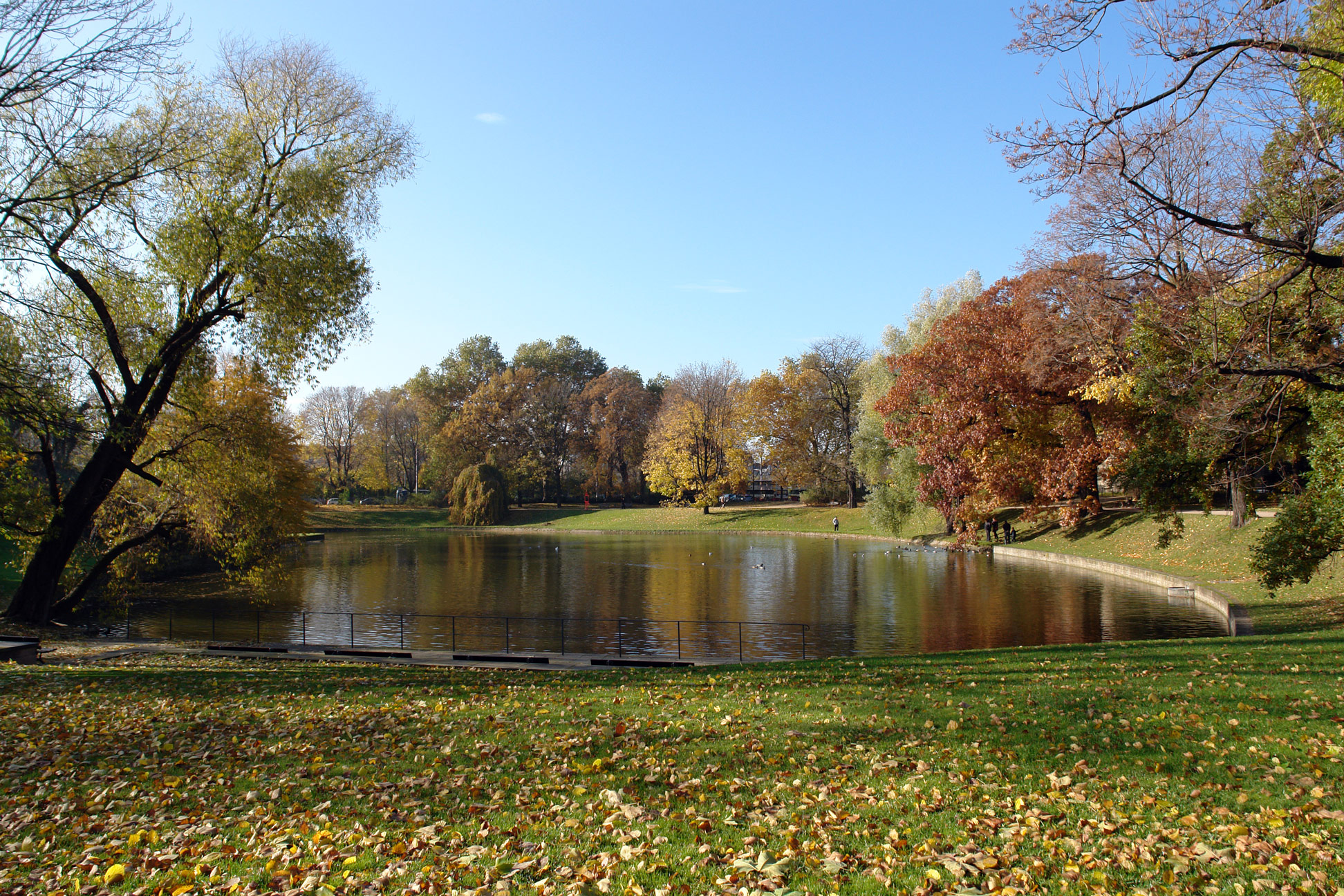 Zwingerteich in Dresden